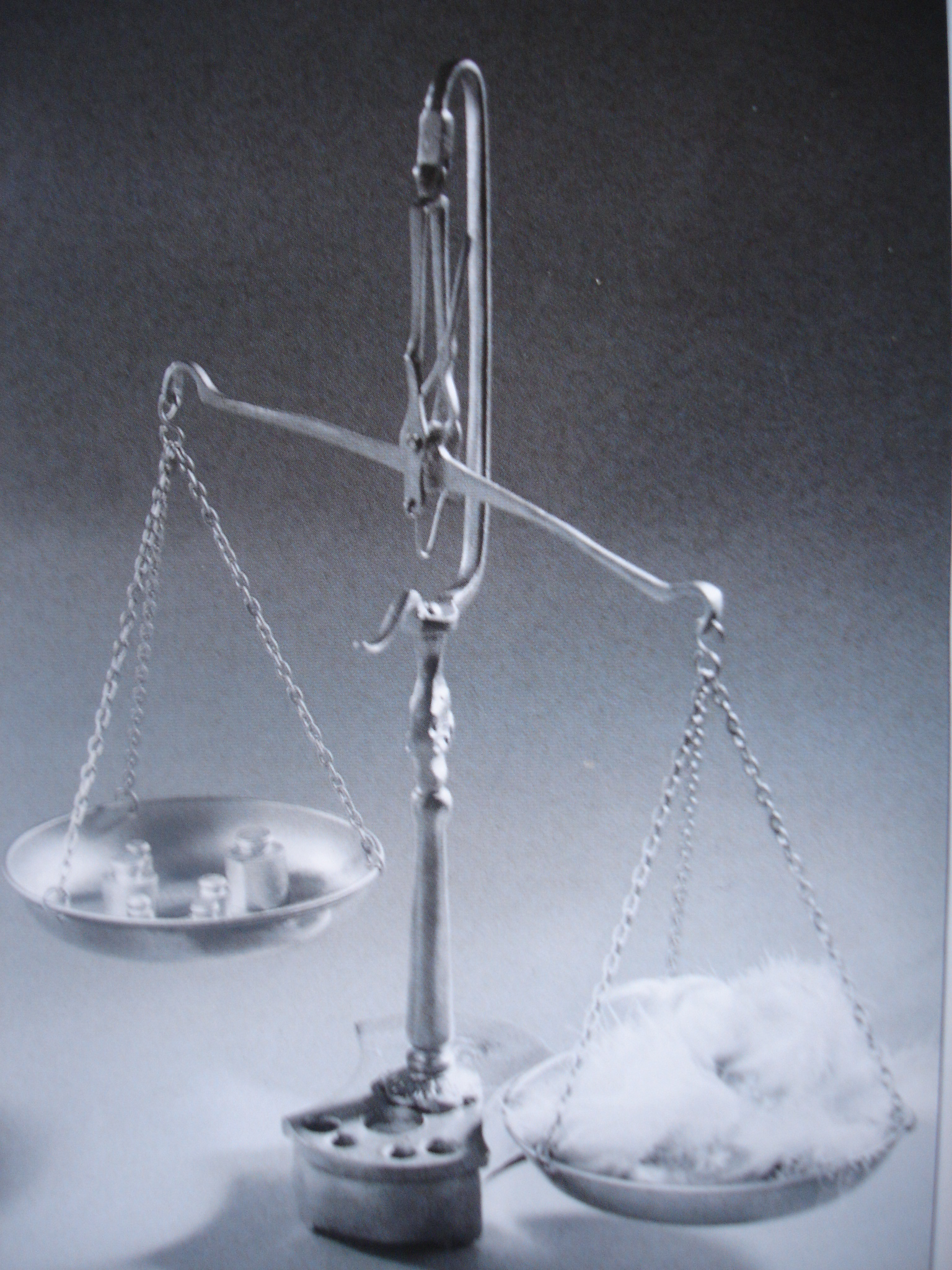 Justice et inégalité : les plateaux de la balance